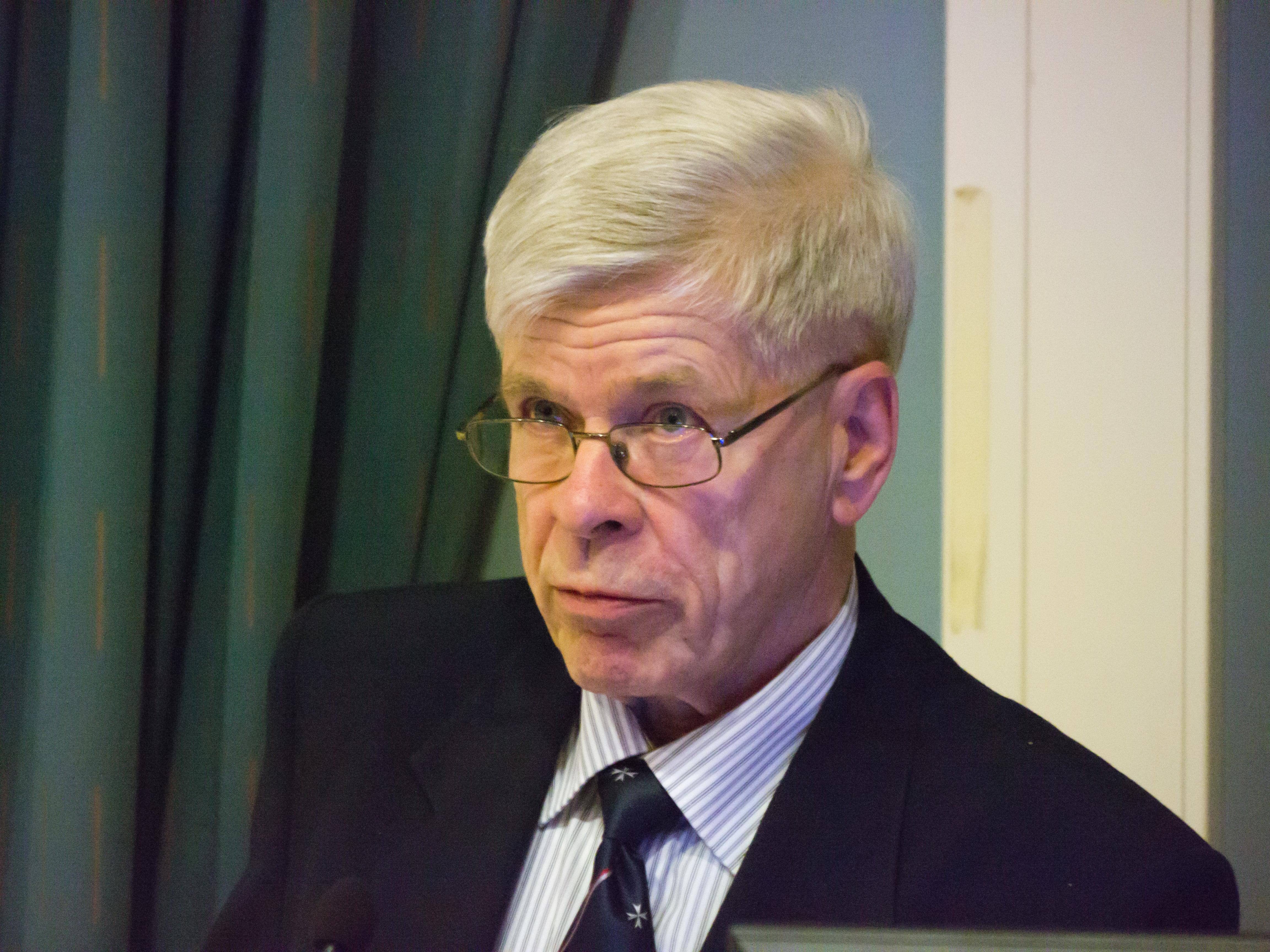 Lauri Hollmen, kirjailija